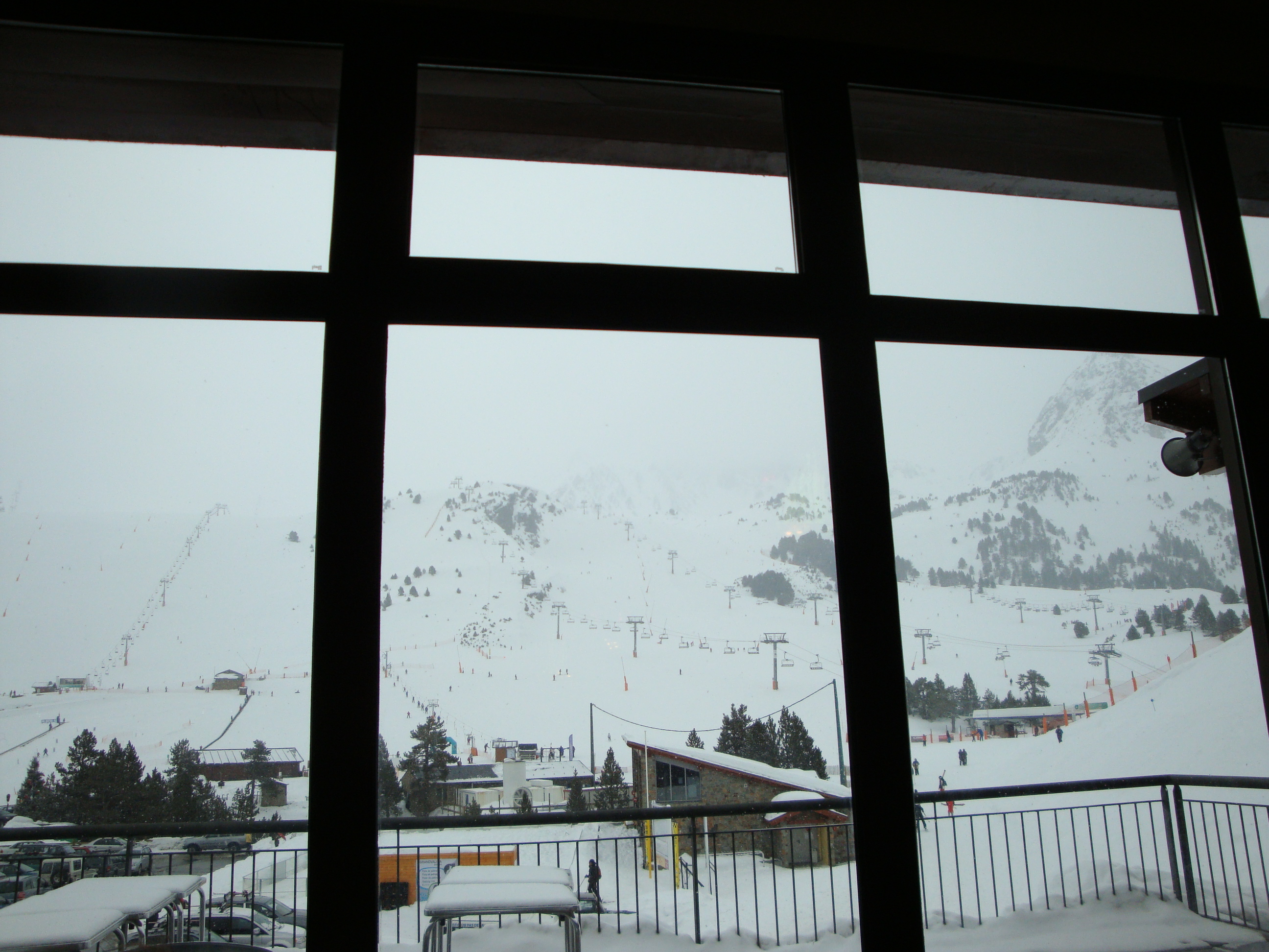 Estación de esquí en Andorra